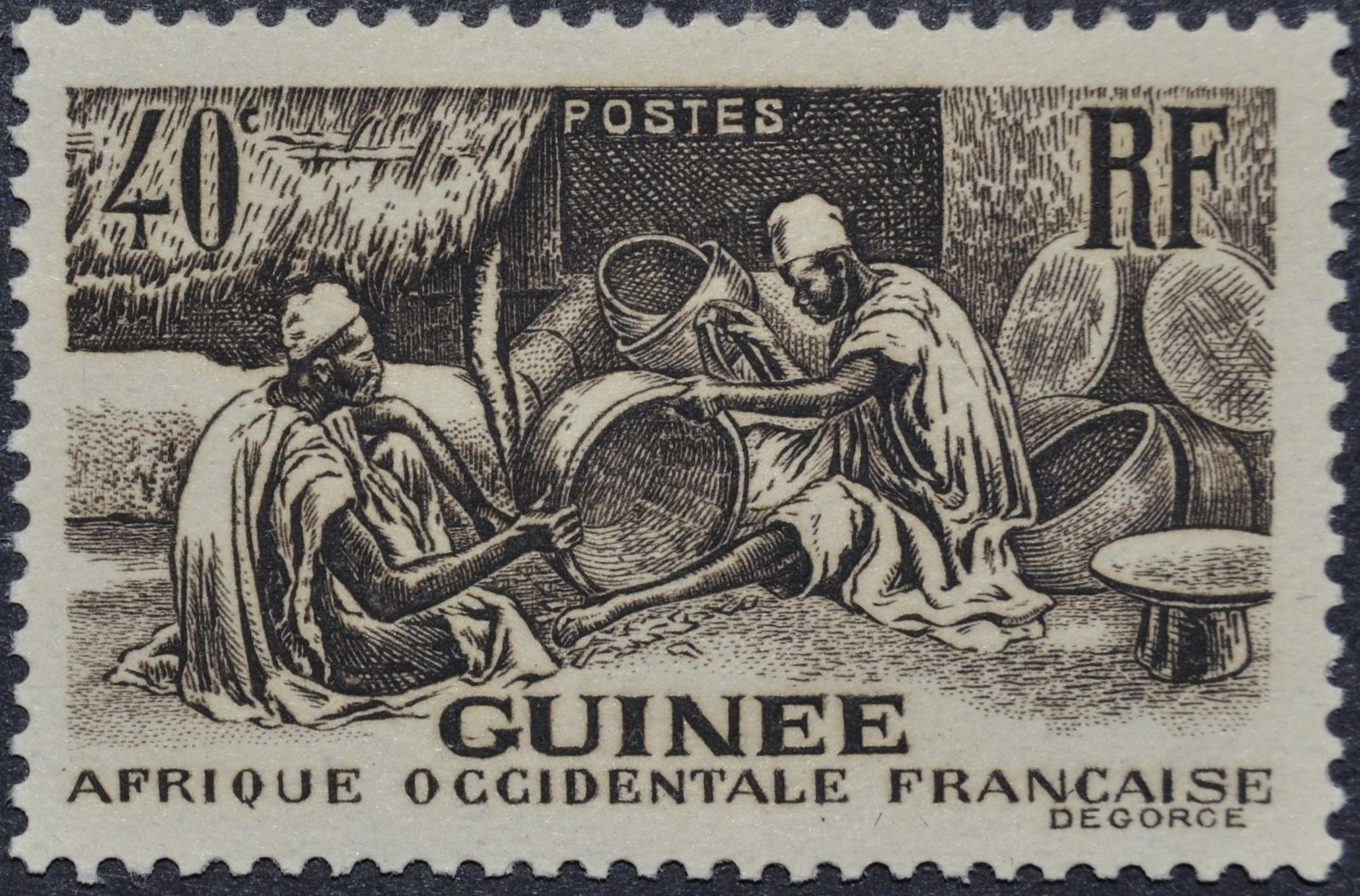 Stamp of French Guinea, 40c, 1938